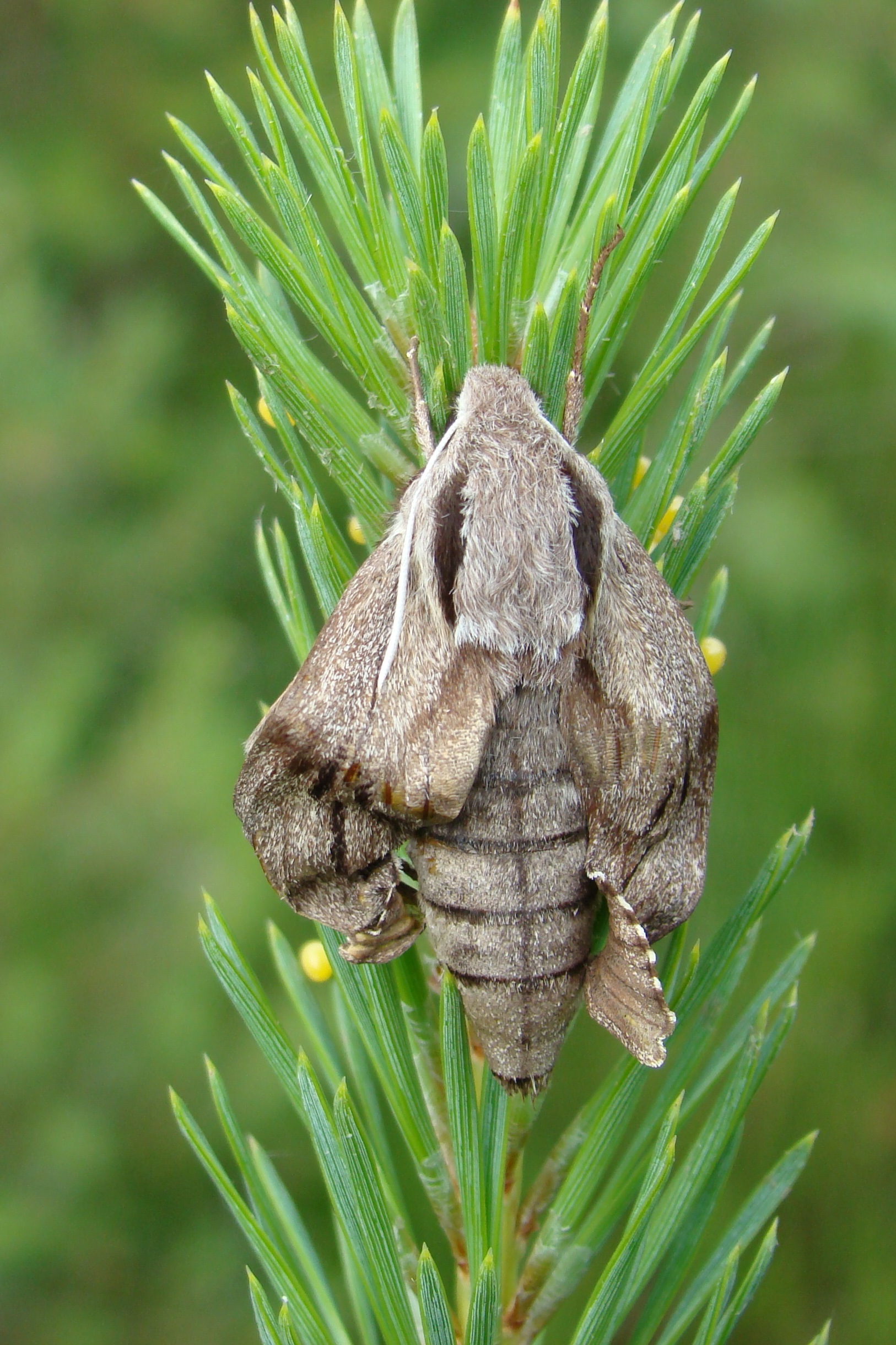 Kiefernschwärmer auch "Tannenpfeil"